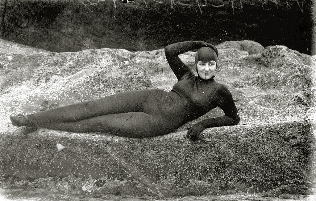 Título original: La artista Elena Cortesina enfundada en un traje de buceo en la playa de la Concha (5/5) Localización: San Sebastián (Guipúzcoa)